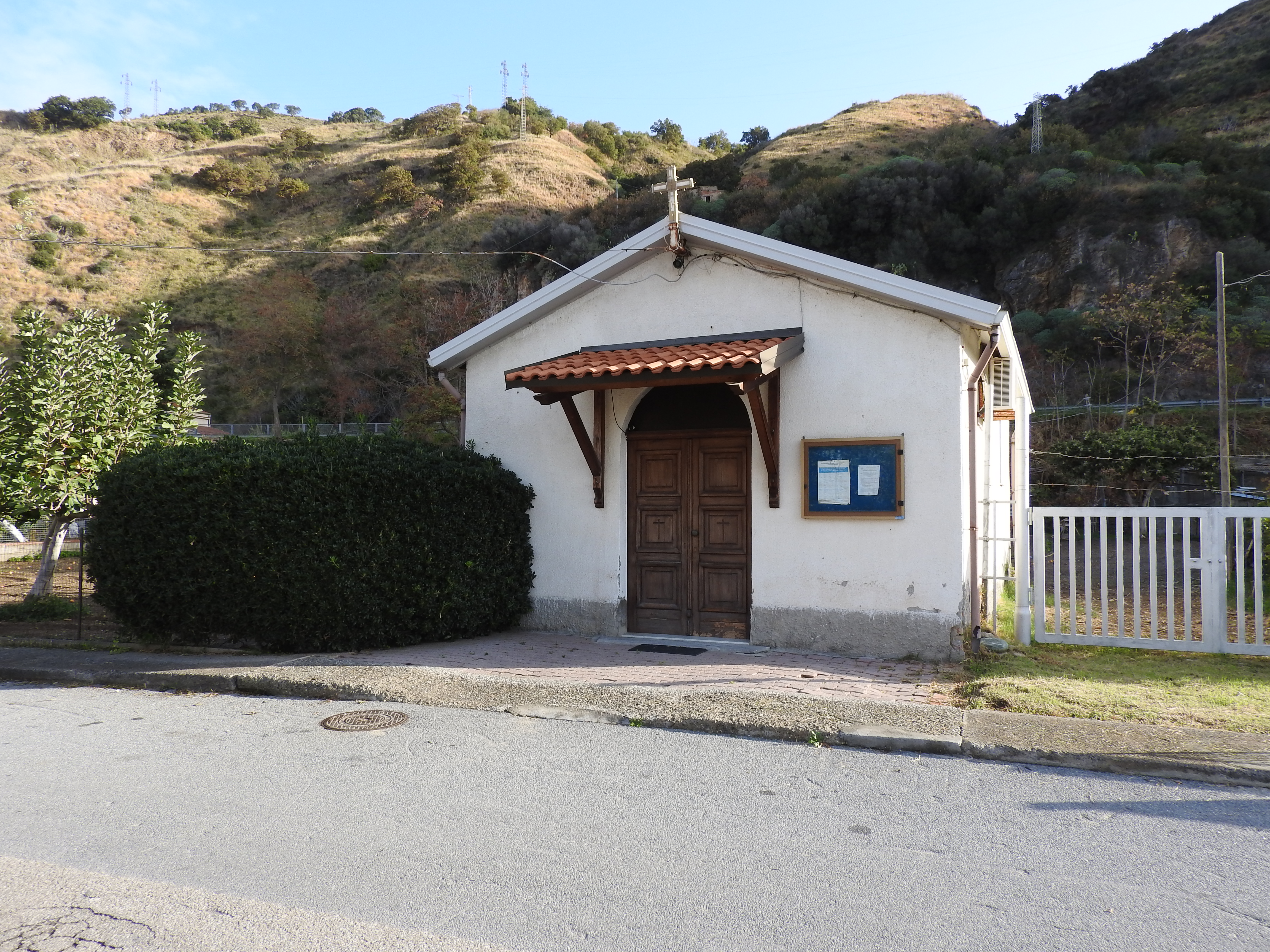 la Chiesa della Madonna degli Angeli di Coreca in una veduta al mattino